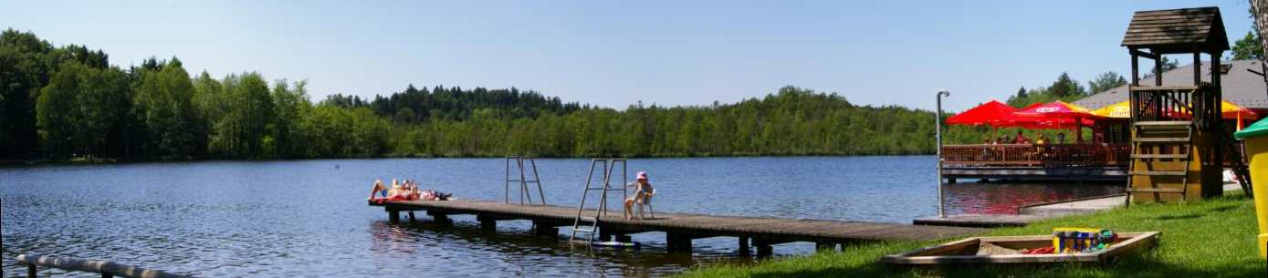 Holzöstersee